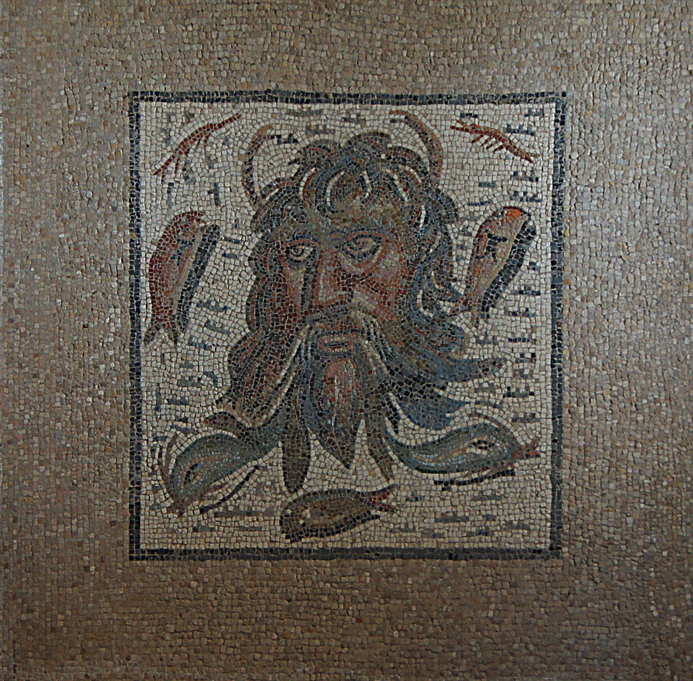 Mascara de Oceano, siglo 2-3 d.J.C. (155-163 cm), hallado en 1959. Alcazar de los Reyes Cristianos, Cordoba, Spain